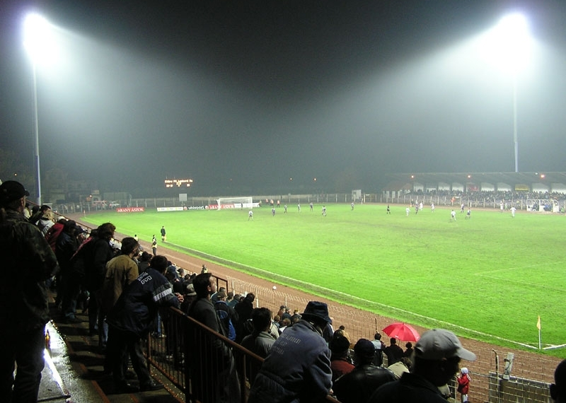 Kórház utcai stadion, Békéscsaba